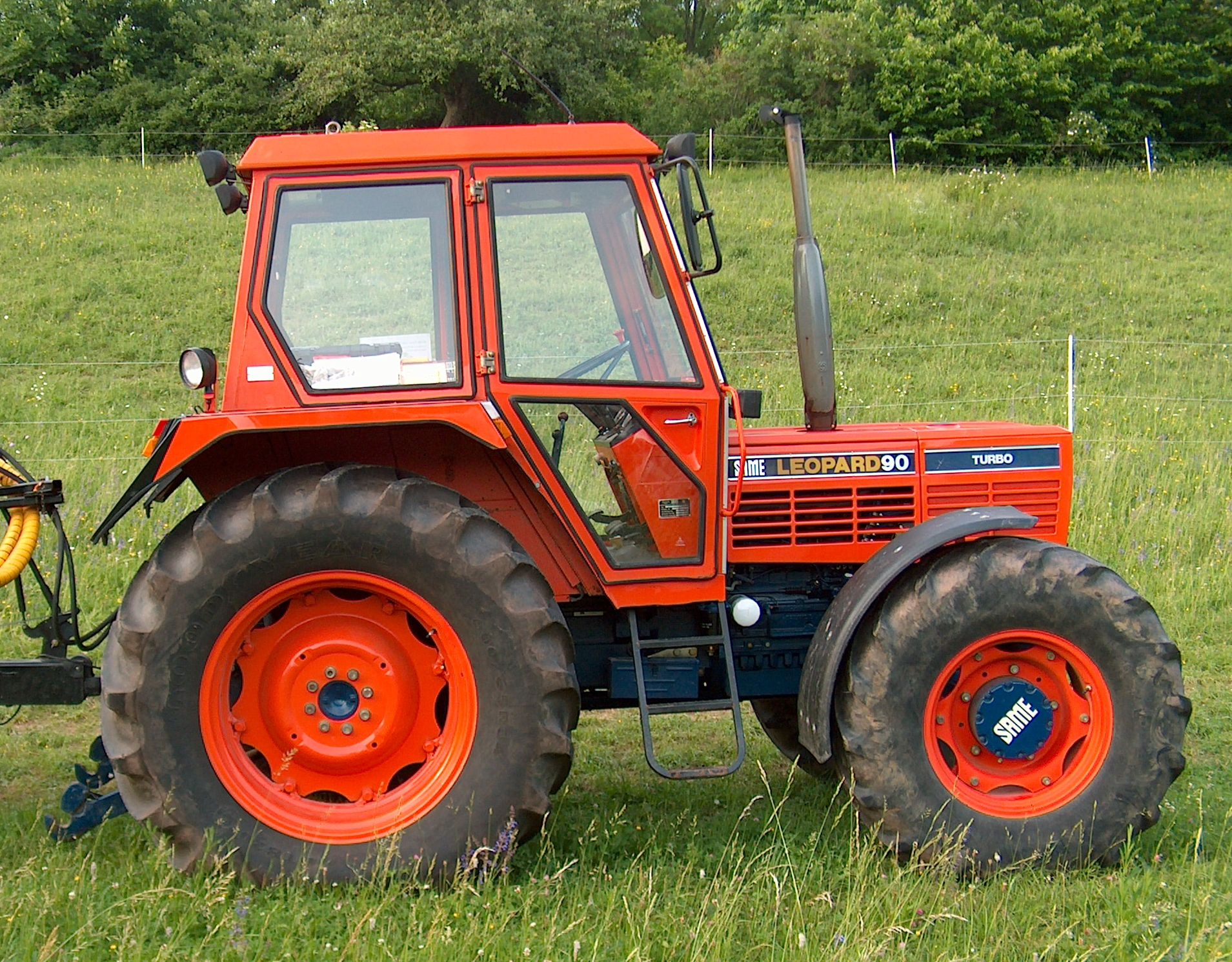 Traktor SAME Leopard 90 Turbo